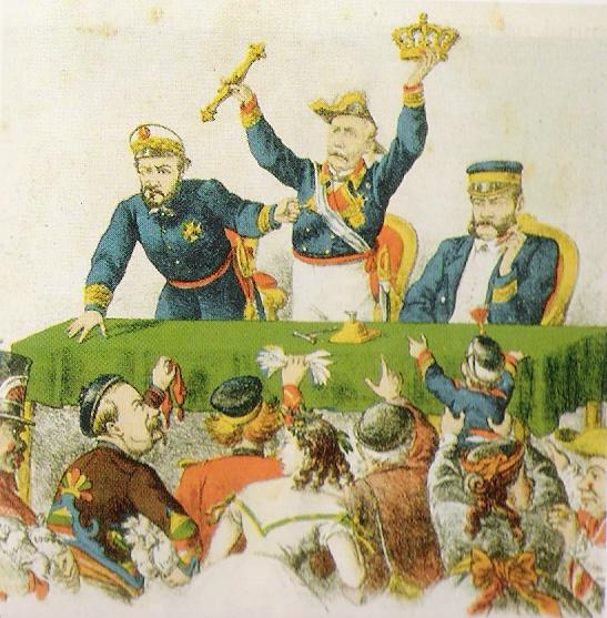 Prim, Serrano & Topete Subasta Corona, La Flaca (1869)